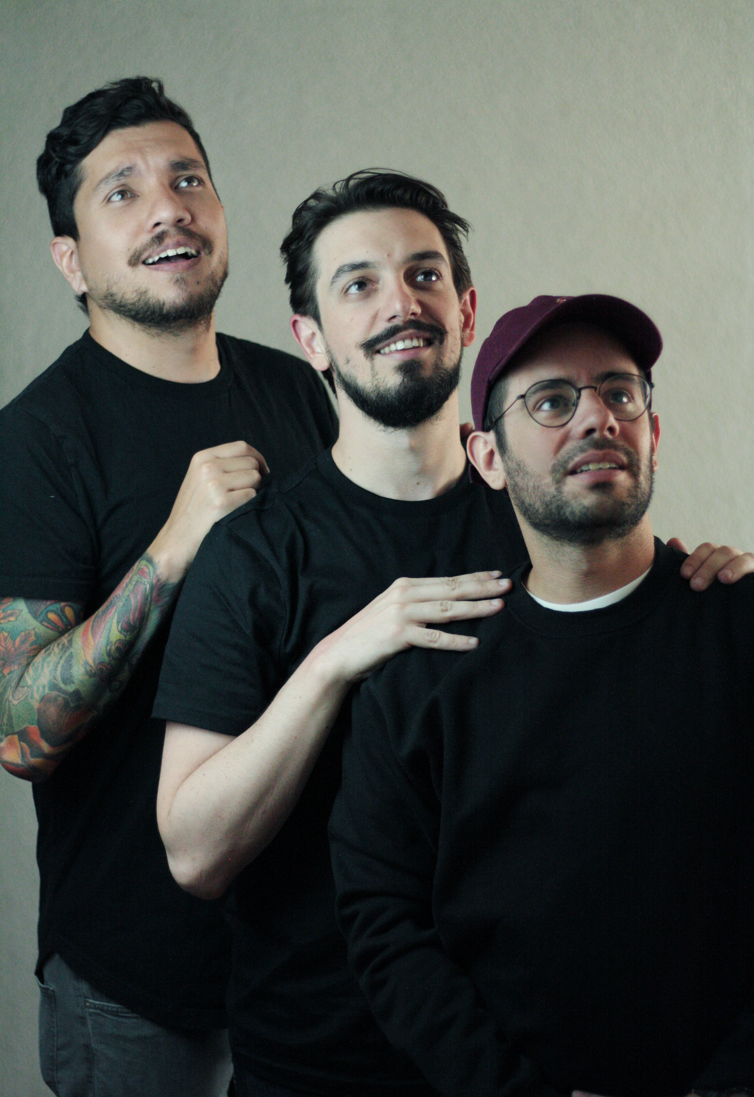 Integrantes de Escuela de Nada